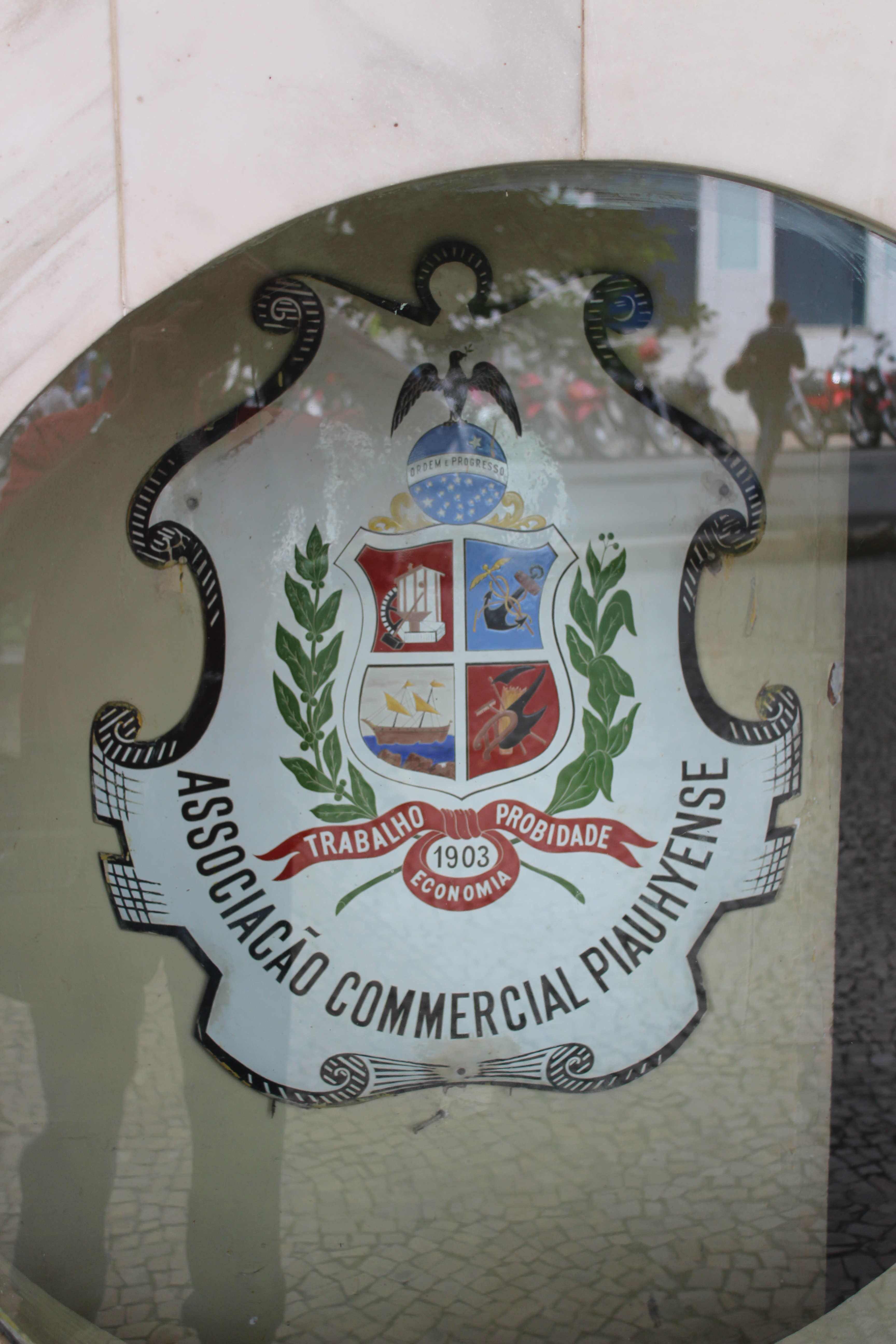 Emblema da Associação Comercial Piauiense feito em metal em 1903 e que se encontra na frente da sede da entidade.